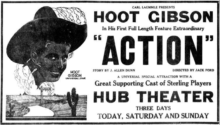 Anuncio en prensa de la película Action (1921), dirigida por Jack Ford y protagonizada por Hoot Gibson.